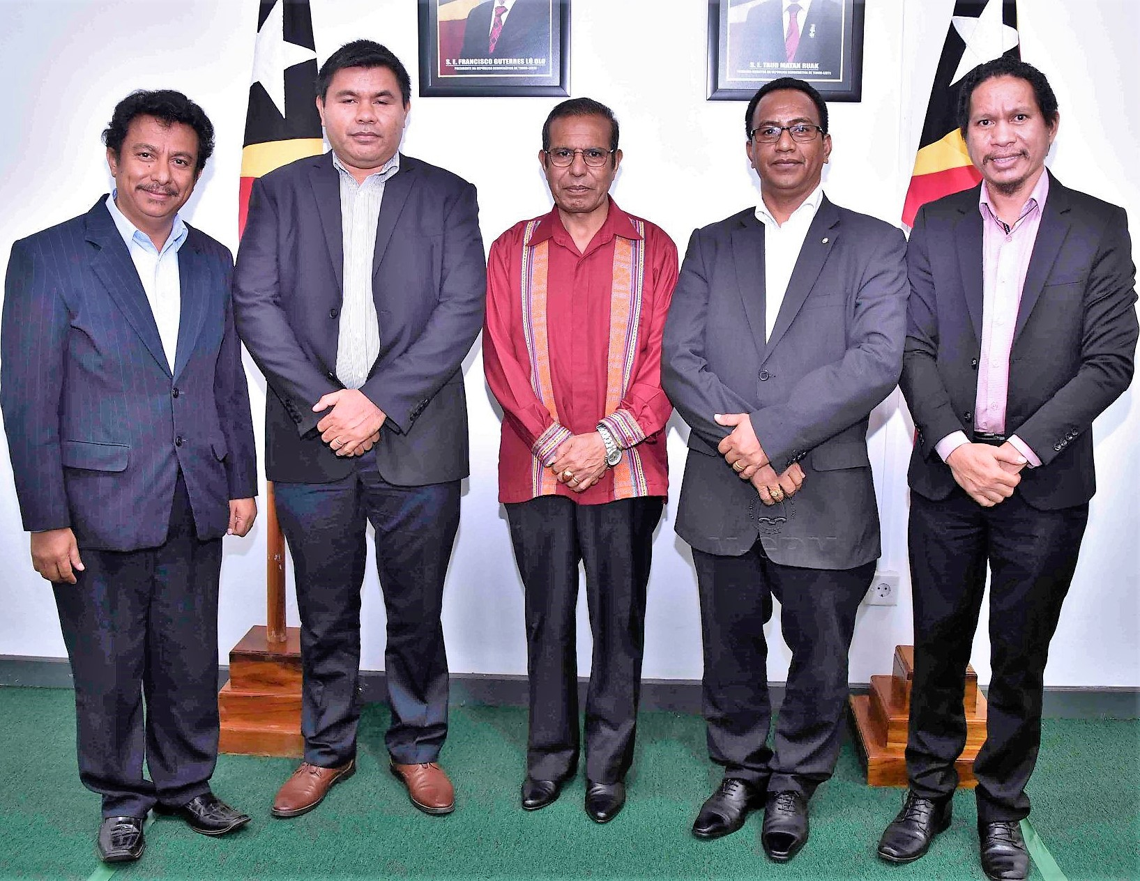 Premierminister Taur Matan Ruak mit der Comissão Anti-Corrupção: Sérgio de Jesus Fernandes da Costa Hornai, Augosto Castro, Luís de Oliveira Sampaio und Alexandre Freitas